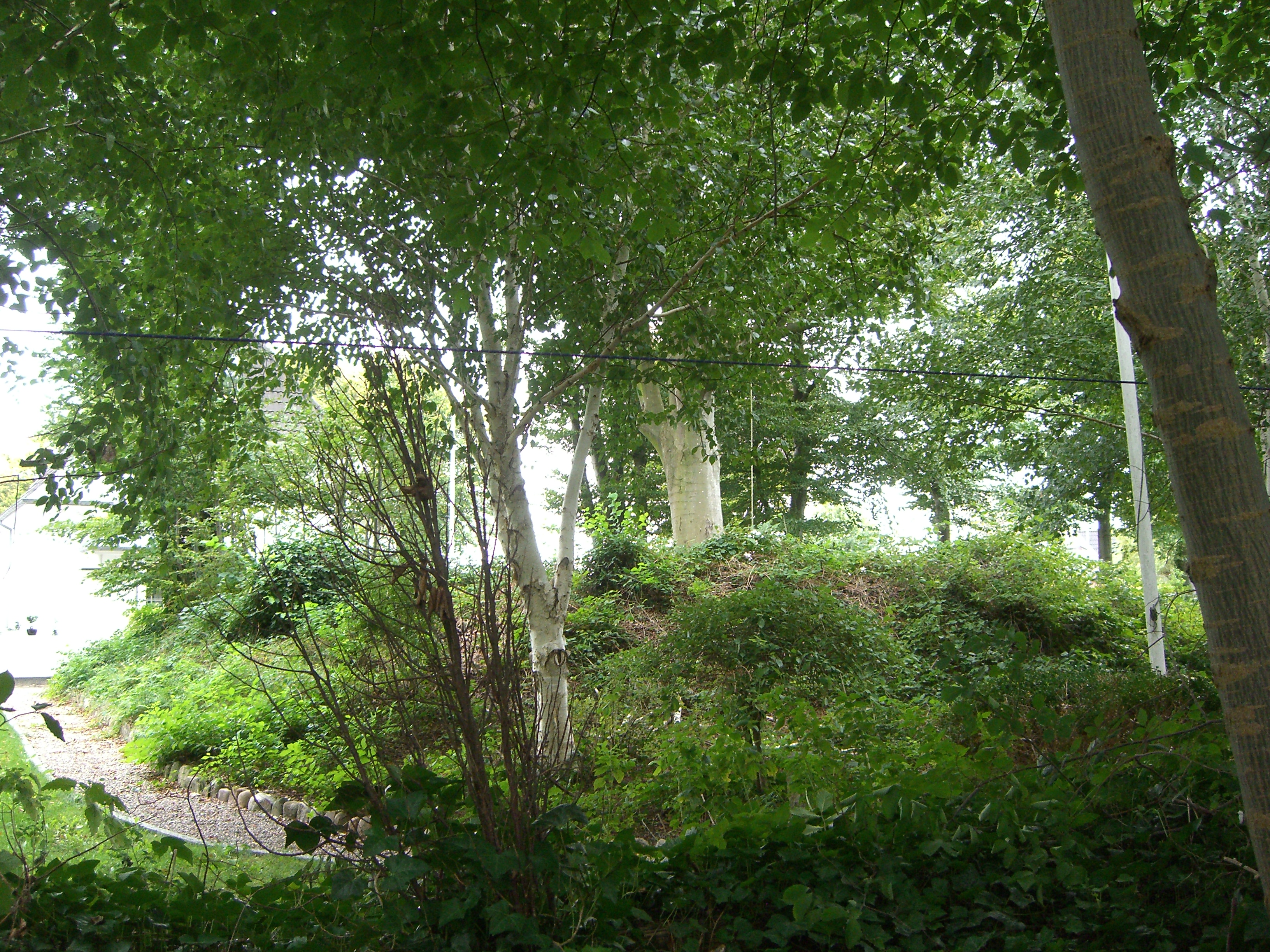 Boldesager - Rundhøj (i privat have)